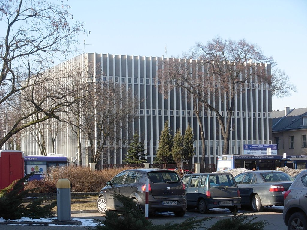 Budynek należący do Collegium Medicum UMK w Bydgoszczy